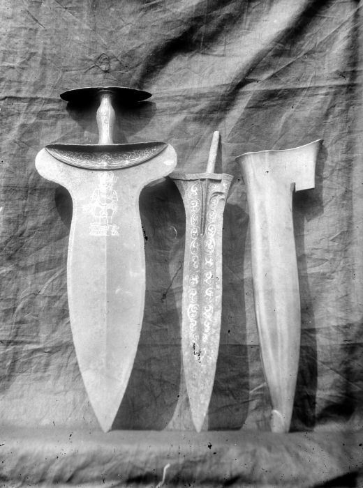 Negatief. Een dolk, een kris en een krishouder uit Pagerroejoeng